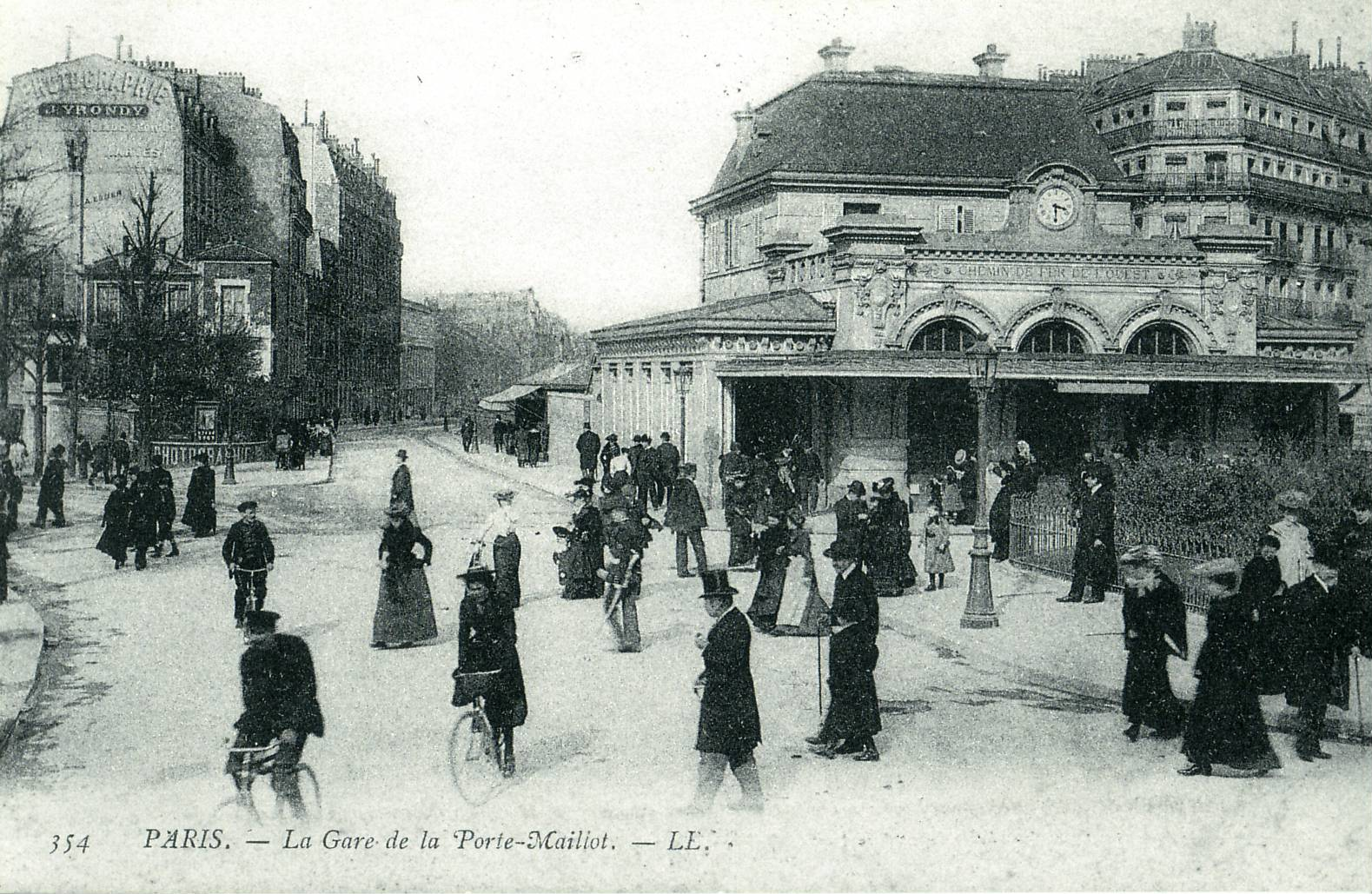 Carte postale ancienne éditée par LL N° 354 Paris - Gare de la Porte Maillot